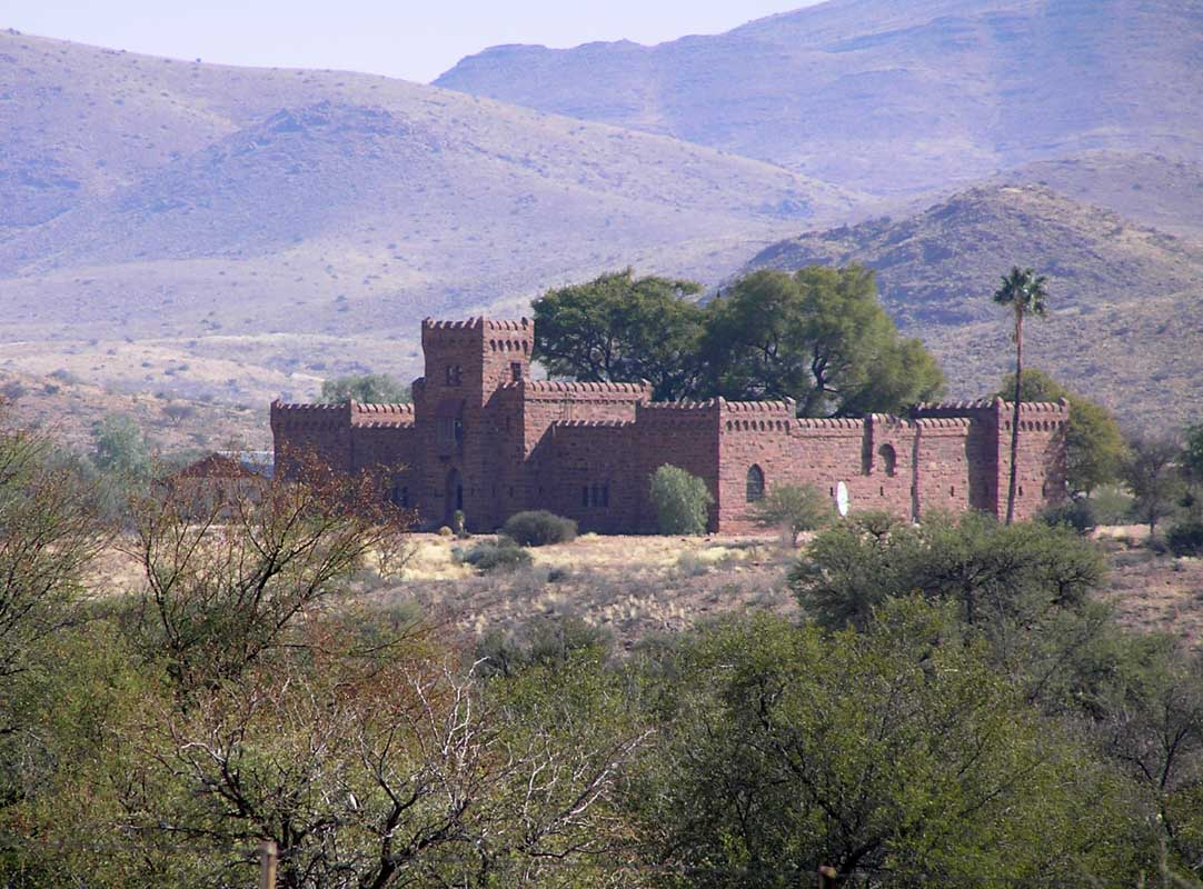 Duwisib Castle, Hardap Namibia